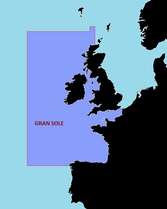 Zona do Gran Sole segundo se entende a efectos pesqueiros. Exluiríanse as 12 millas de mar territorial.